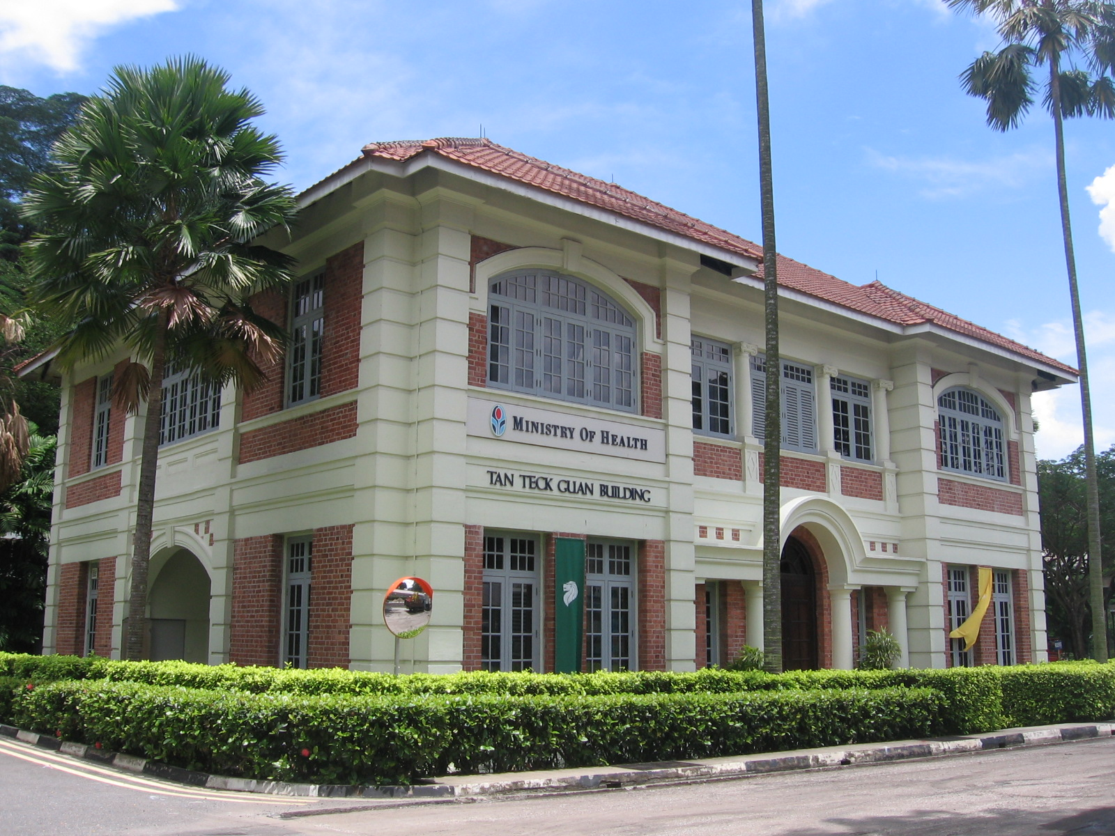 Tan Teck Guan Building